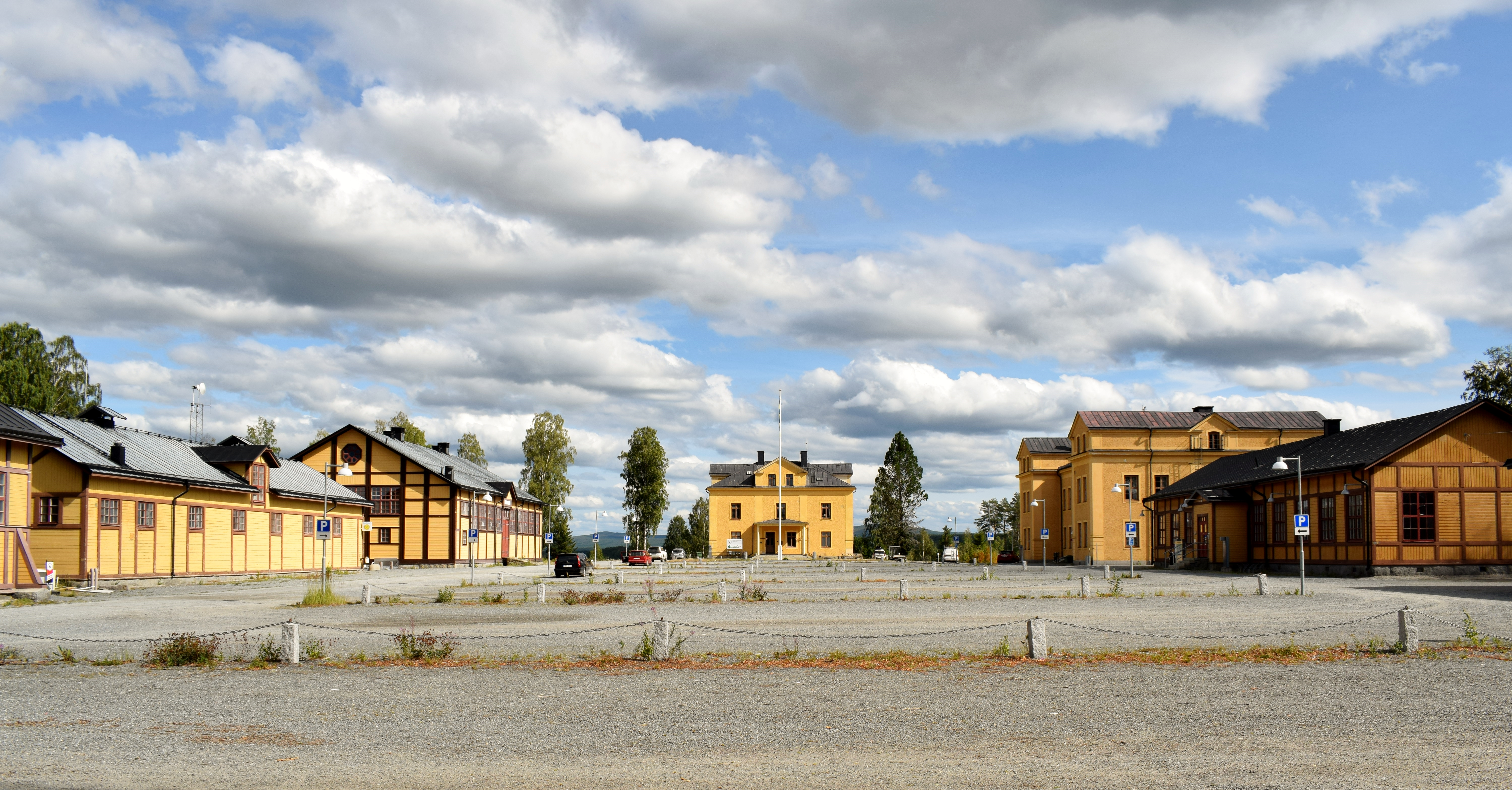 Kaserngården vid det före detta trängregementet i Sollefteå.